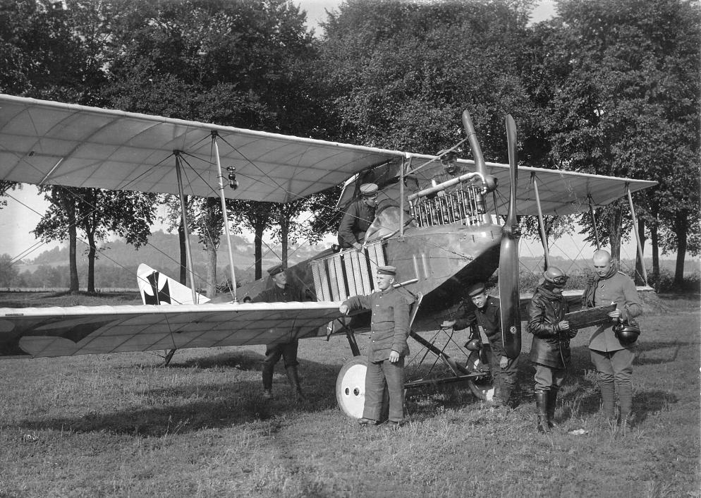 Eine gestellte Aufnahme, die zeigt, wieviel Mann (inklusive Bodenpersonal) nötig waren um einen Flug mit diesem Flugzeug durchzuführen